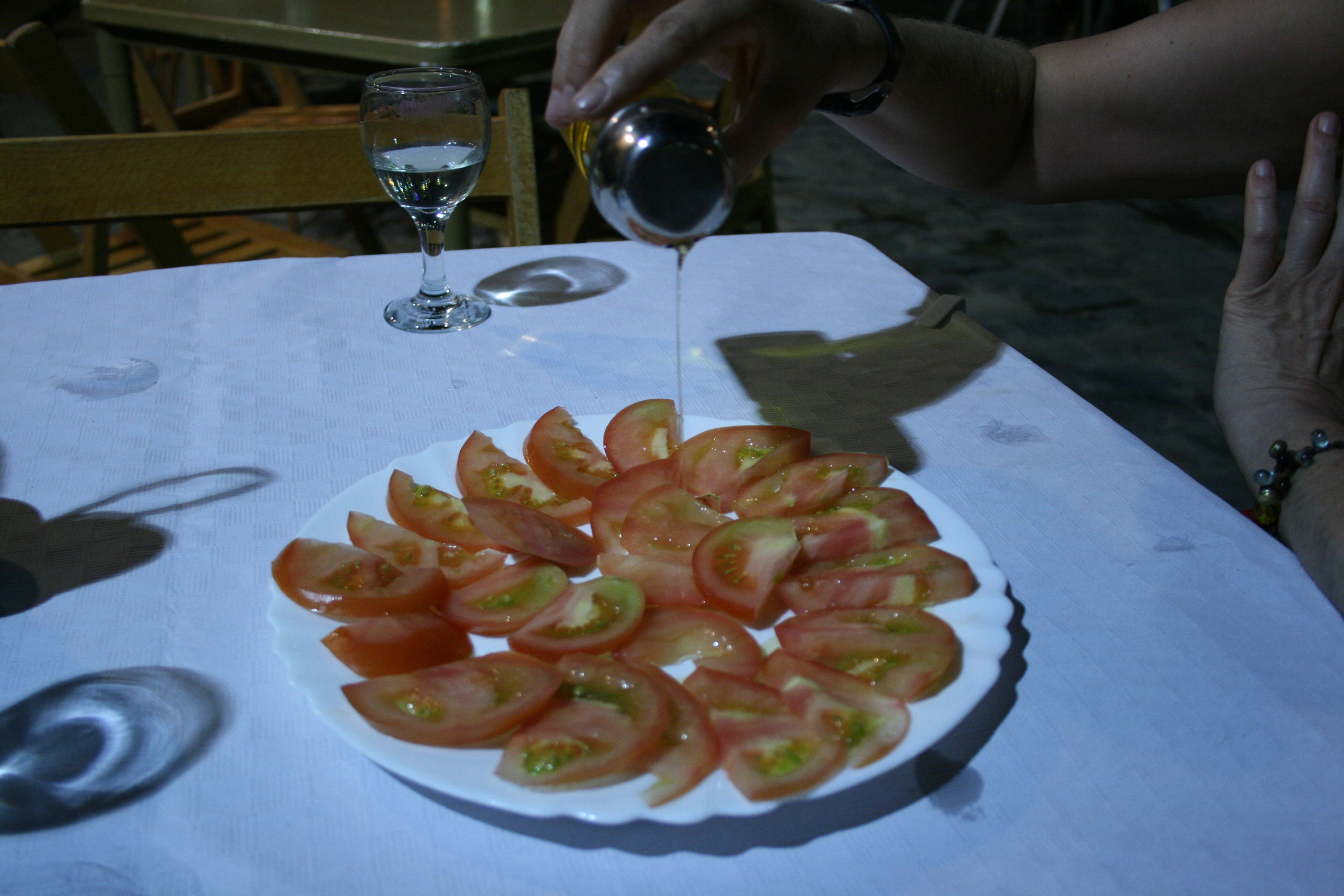 Aliñar tomates